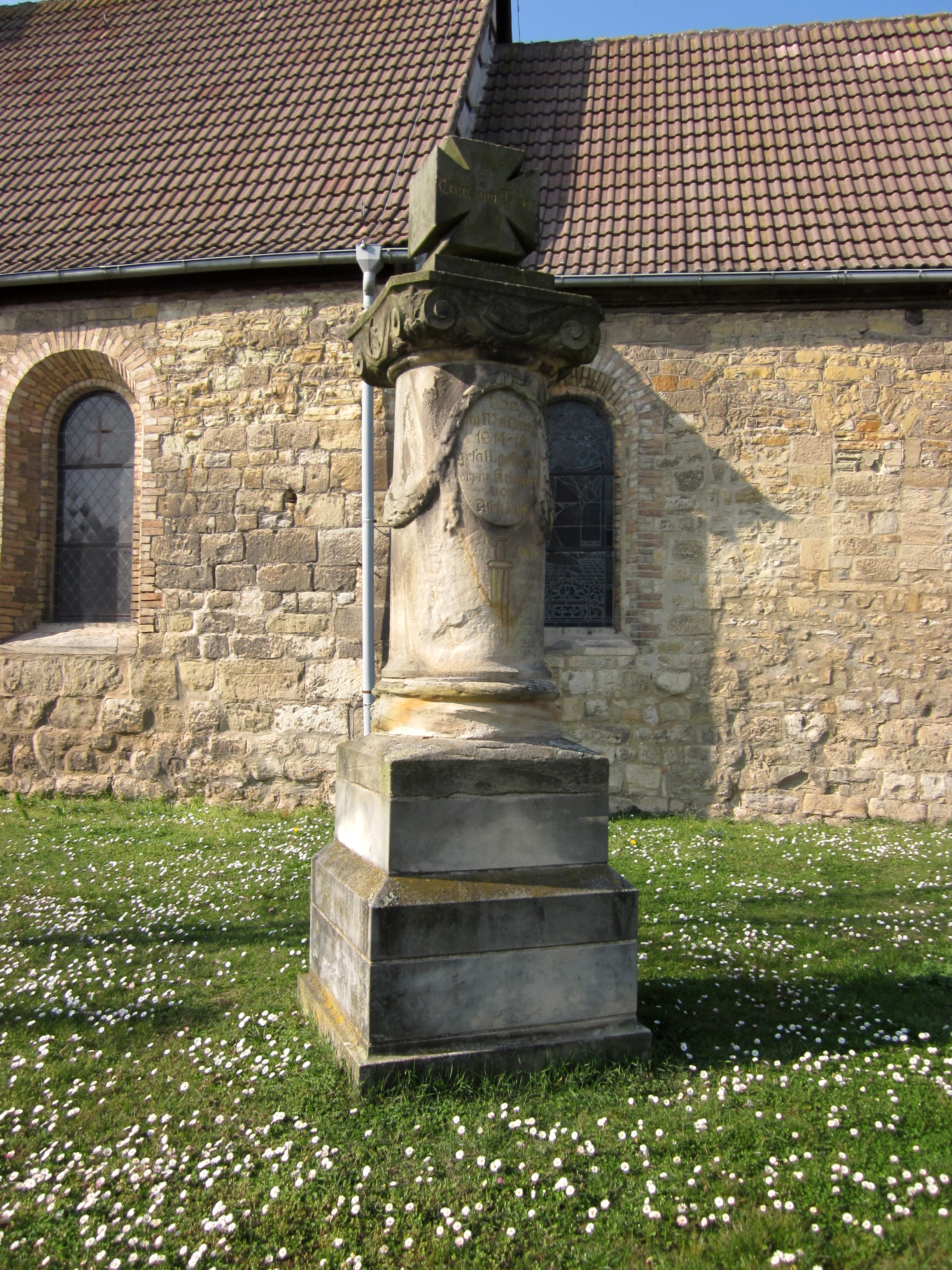 Kriegerdenkmal in Asendorf (Gemeinde Teutschenthal, Saalekreis, Sachsen-Anhalt)